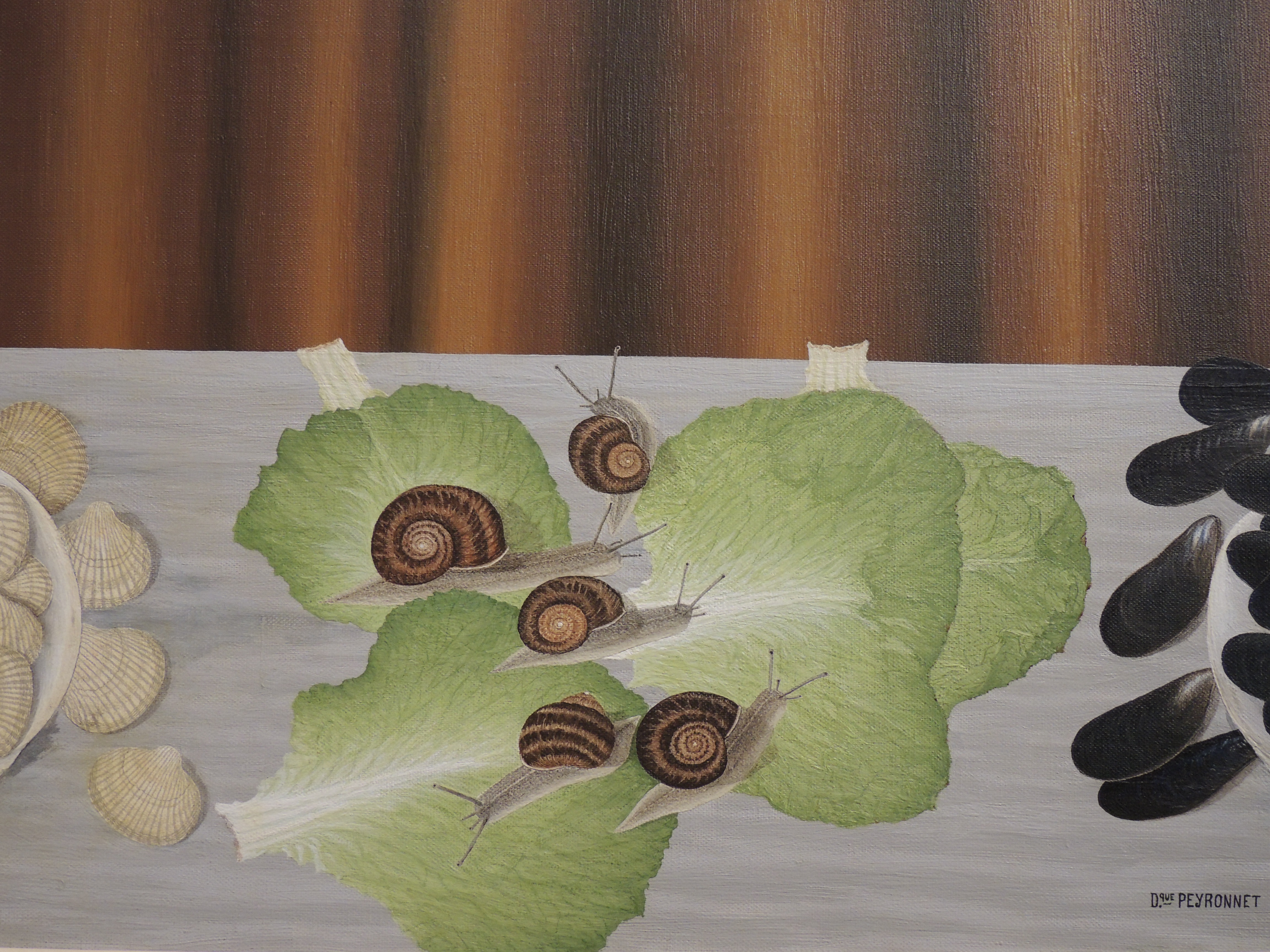 Dominique Peyronnet, Coques, escargots, moules, huile sur toile